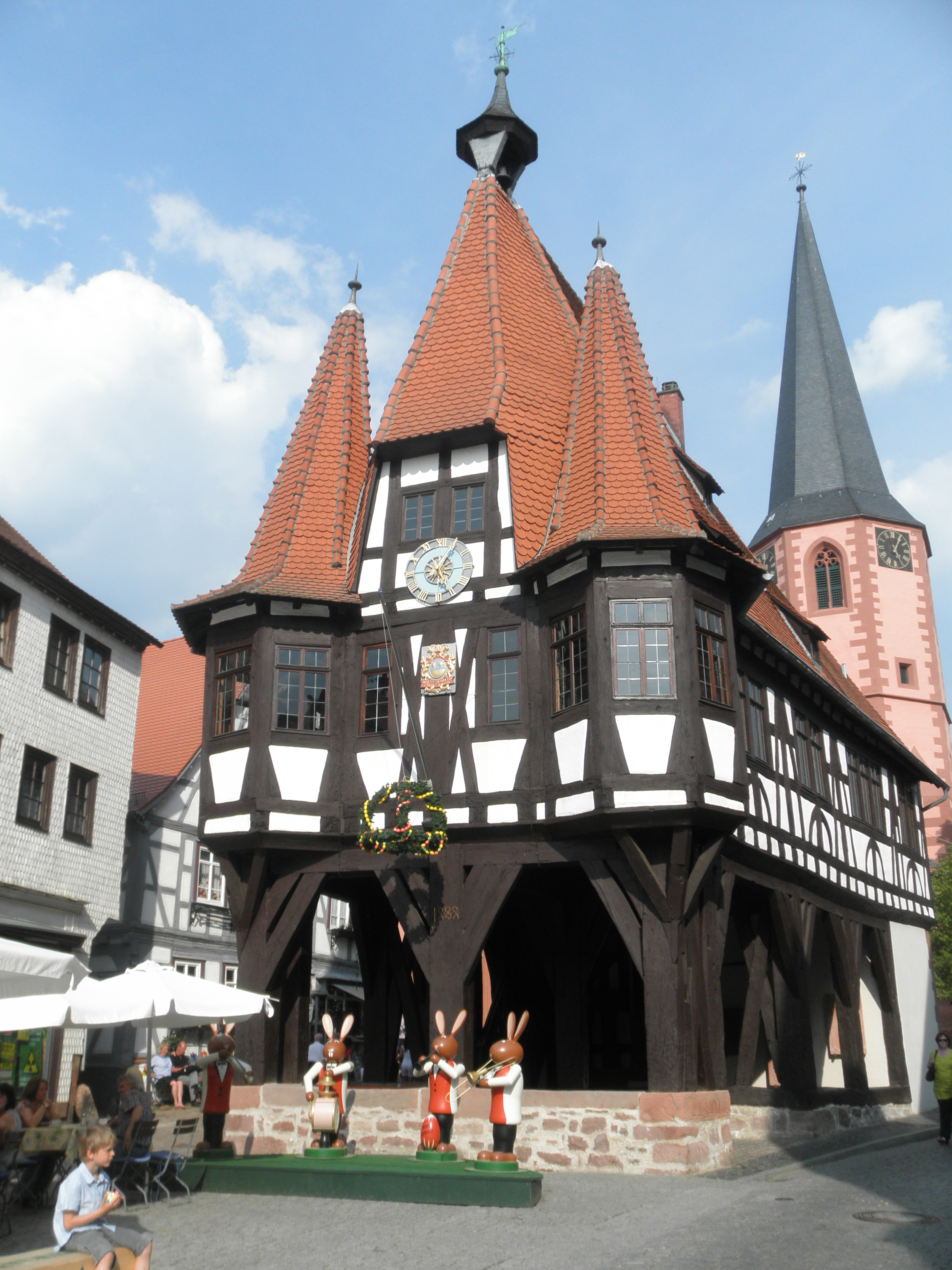 Urbodomo Michelstadt dum pasko